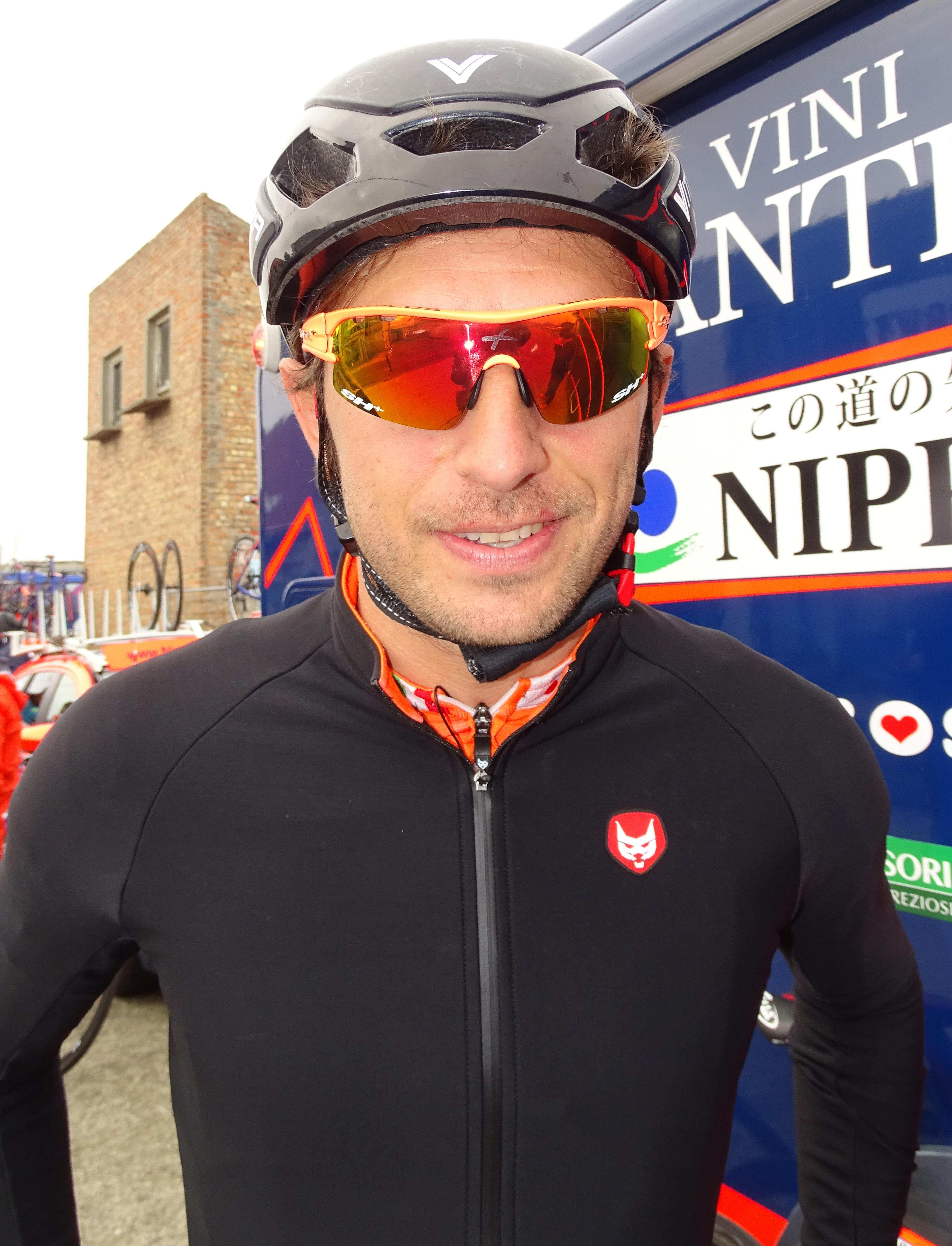 Reportage réalisé le vendredi 18 mars à l'occasion du départ de la Handzame Classic 2016 à Bredene, Belgique.